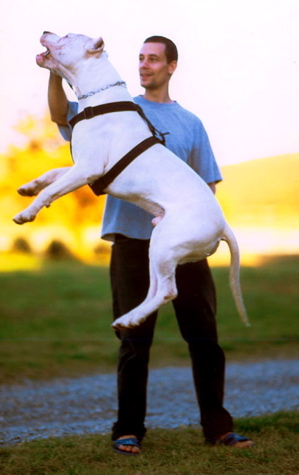 A Dogo Argentino jumping.